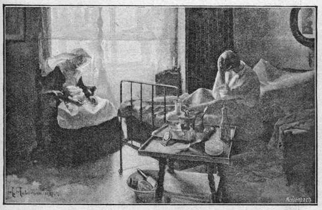 Morgendämmerung (in der Krankenstube)